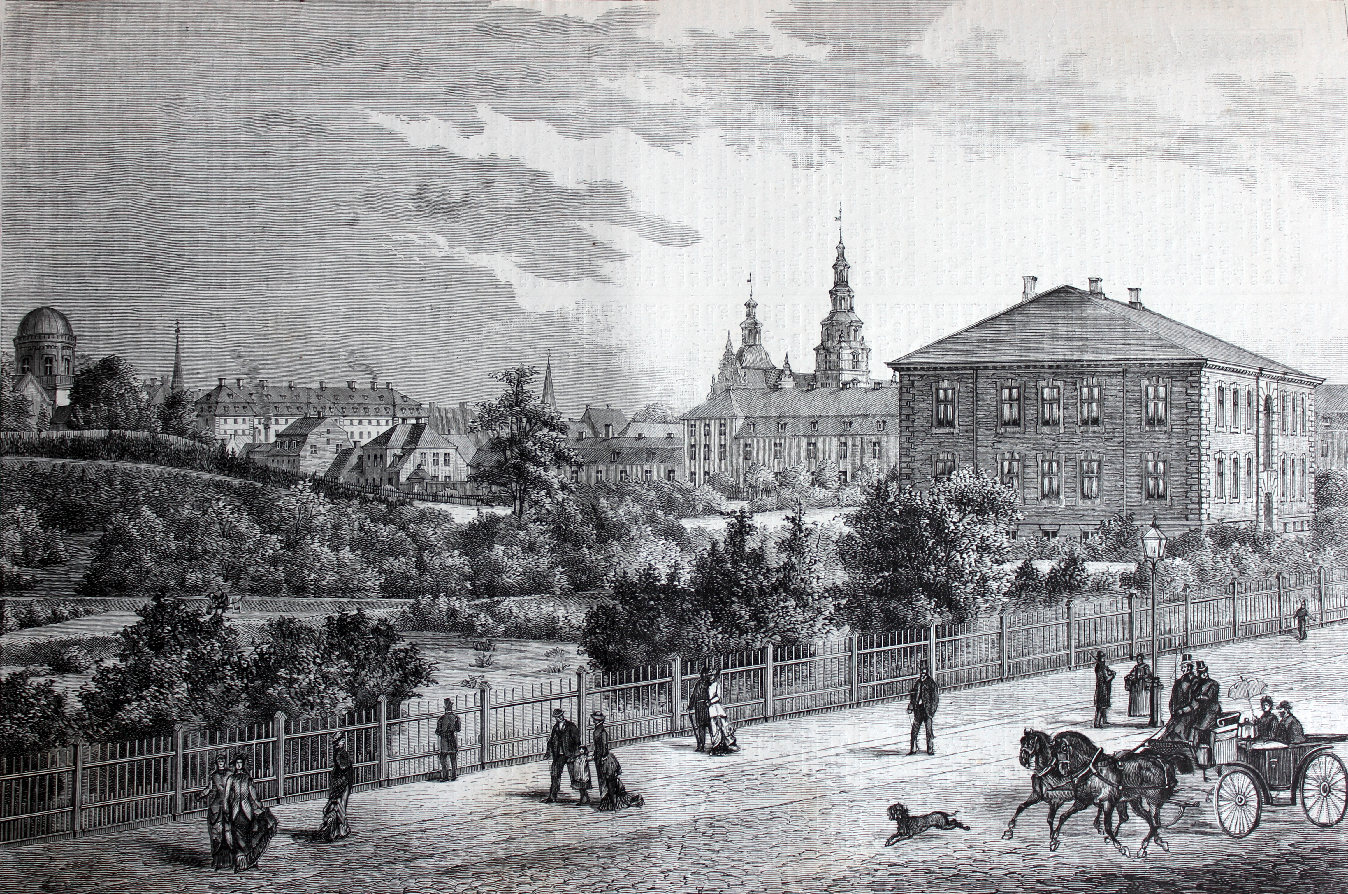 Fra Illustreret Tidende den 23. januar 1881. Original billedtekst: Udsigt fra "Kunstnerhjemmet" i Gothersgade, tegnet af Arkitekt C.V. Nielsen.